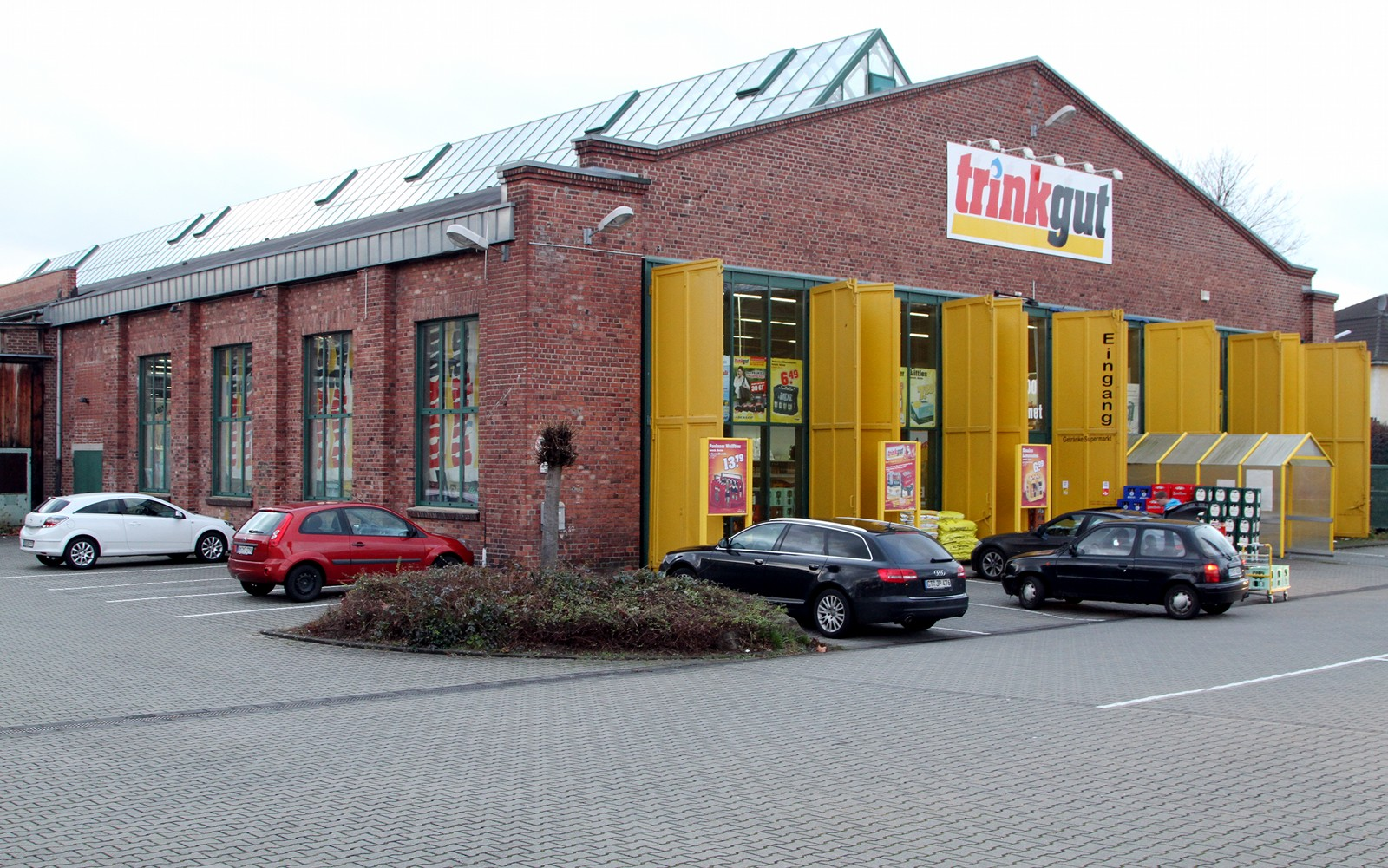 ehemaliges Eisenbahndepot in Frechen, Drehort der Fernsehsendung Bio's Bahnhof This is a photograph of an architectural monument. 103